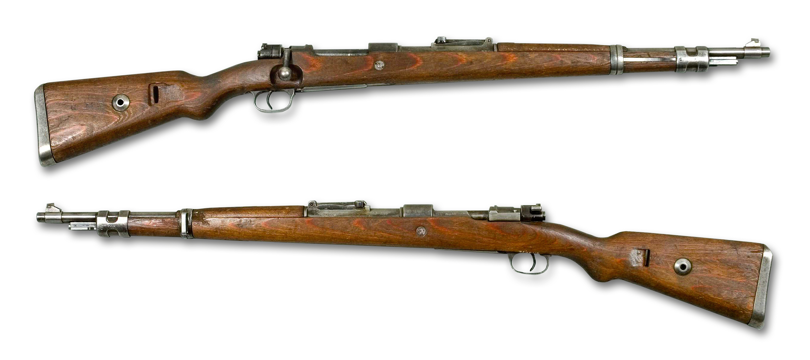 Darstellung eines Karabiner 98k